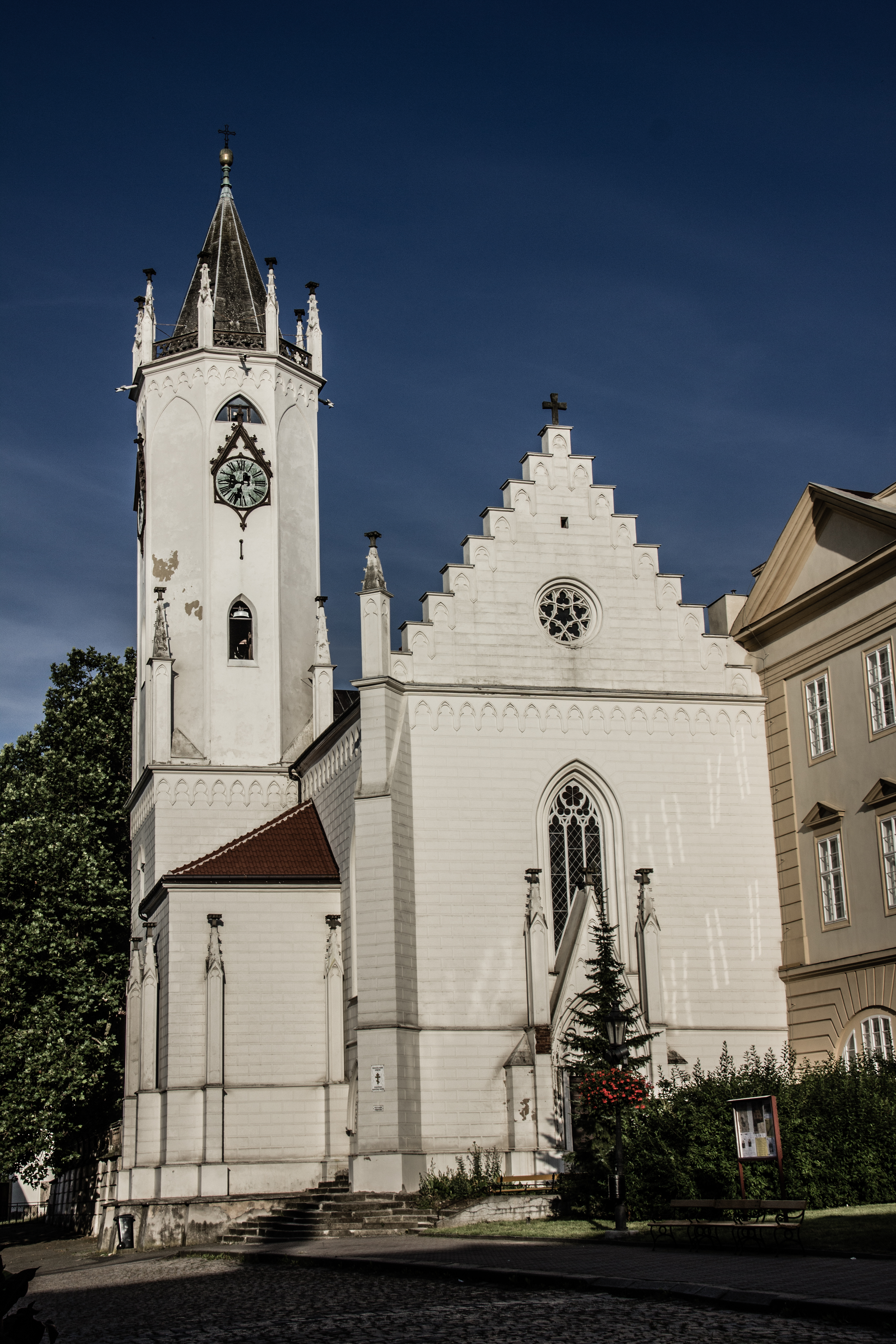 Pravoslavný kostel Povýšení svatého Kříže, Zámecké náměstí, Teplice.